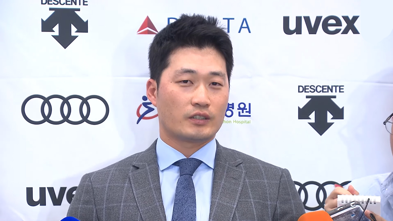 메이저리그 첫 시즌을 종료한 오승환 귀국 인터뷰.